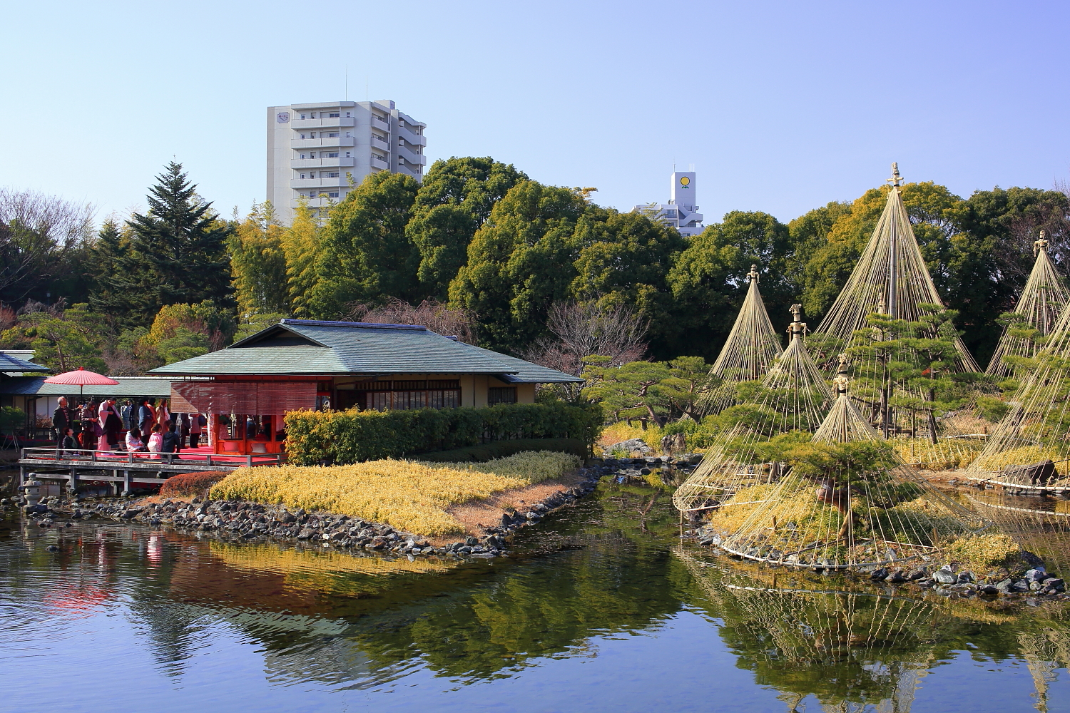 白鳥庭園（名古屋市熱田区、2014年（平成26年）1月）